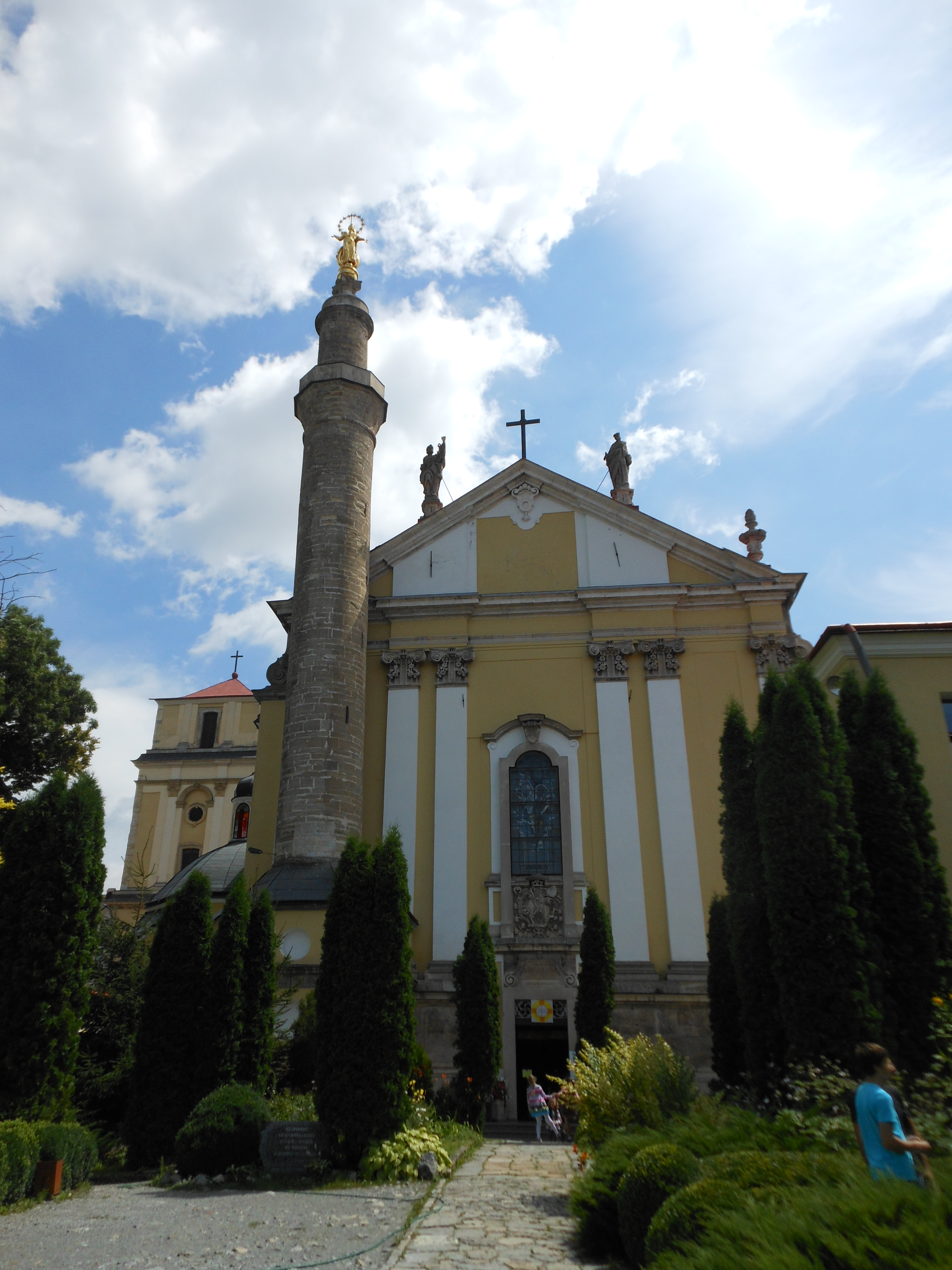 Кафедральний костел, Кам'янець-Подільський, вул. Татарська, 20